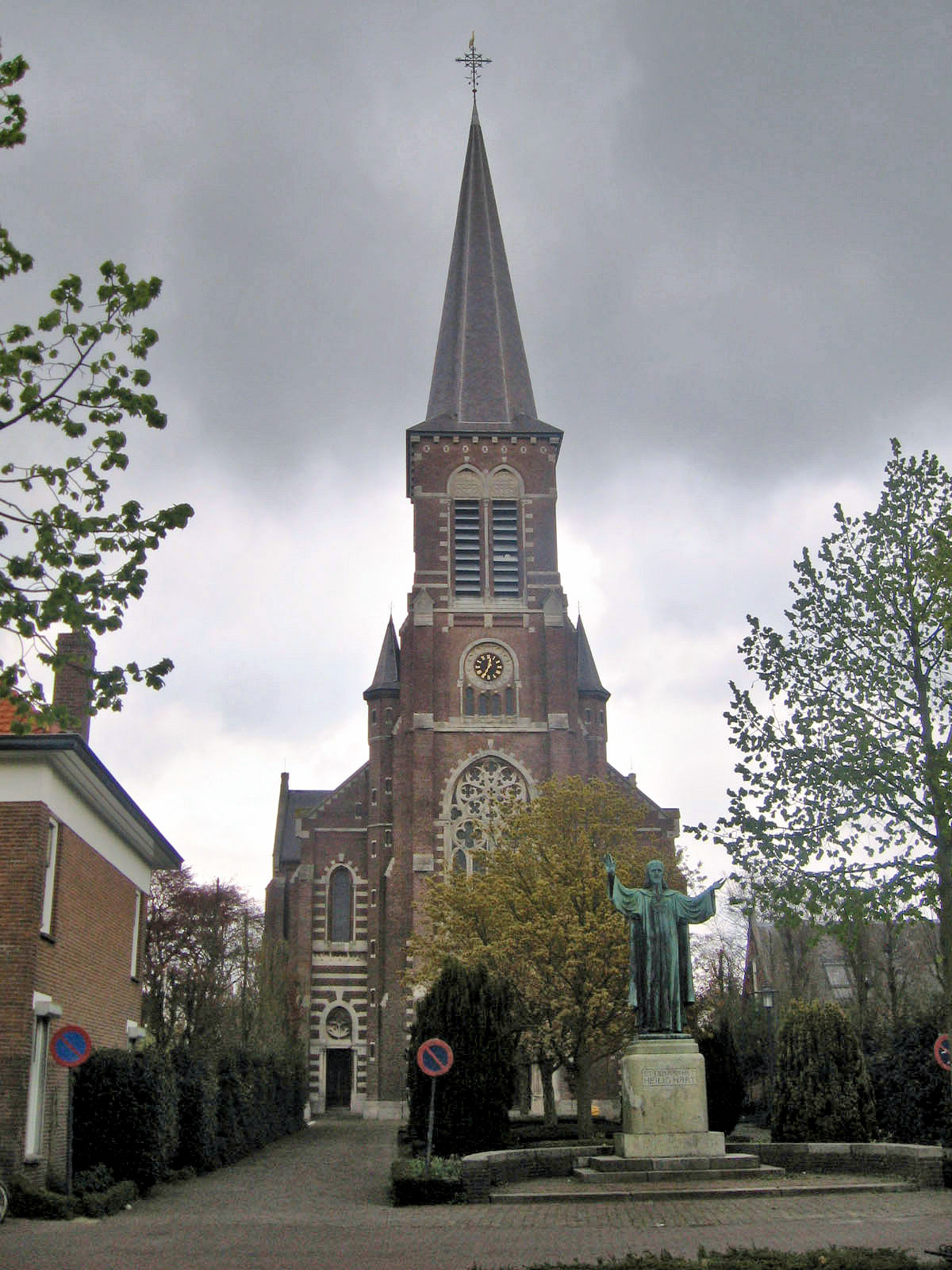 Etten-Leur, 30 april 2006